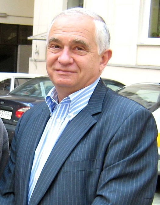 Janusz Zemke (ur. 24 lutego 1949 w Kowalewie) - polityk, działacz SLD, wiceminister obrony narodowej w latach 2001-2005, wieloletni poseł na Sejm.